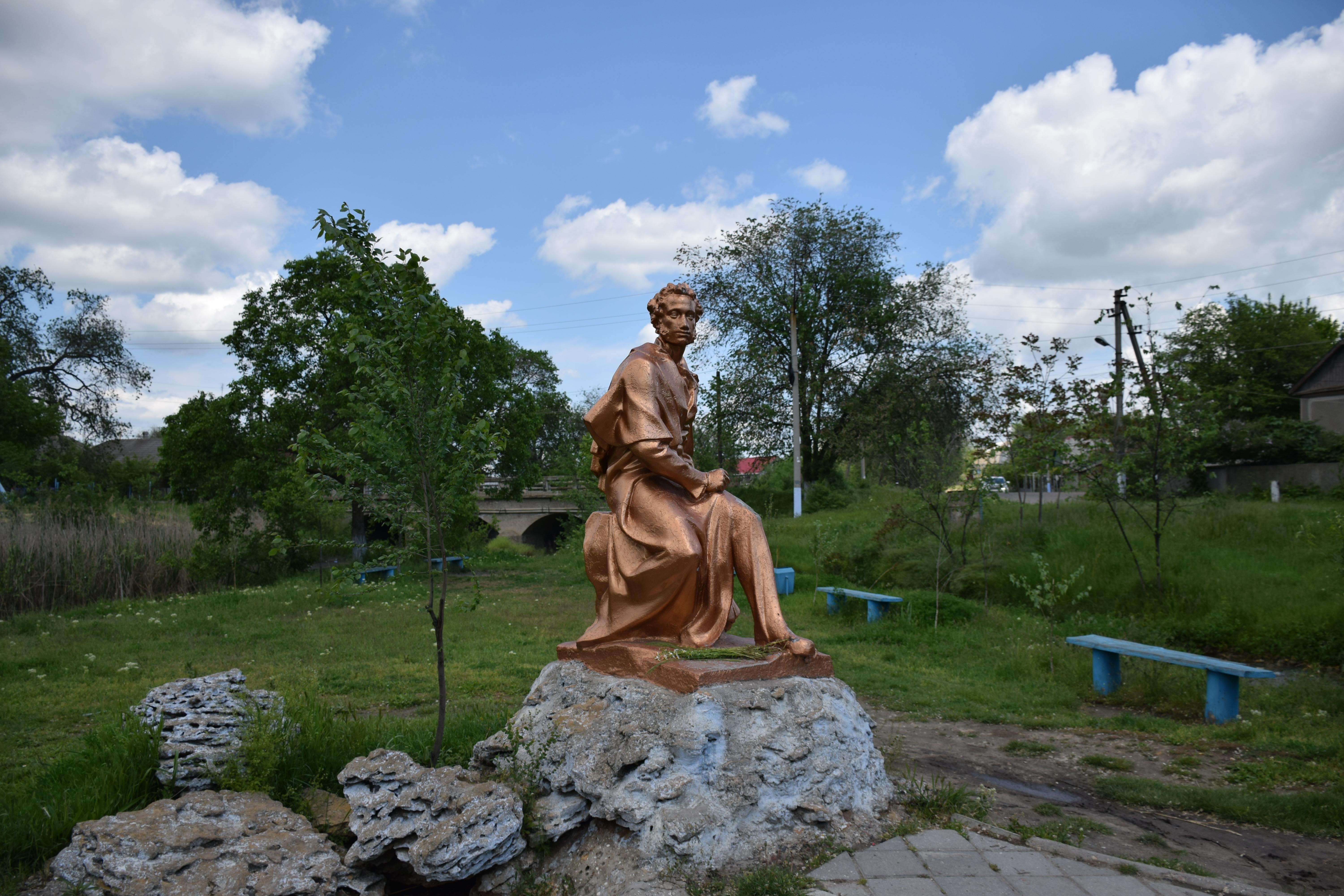 Пам’ятник О.С.Пушкіну, Татарбунари, парк на березі р. Фонтанка